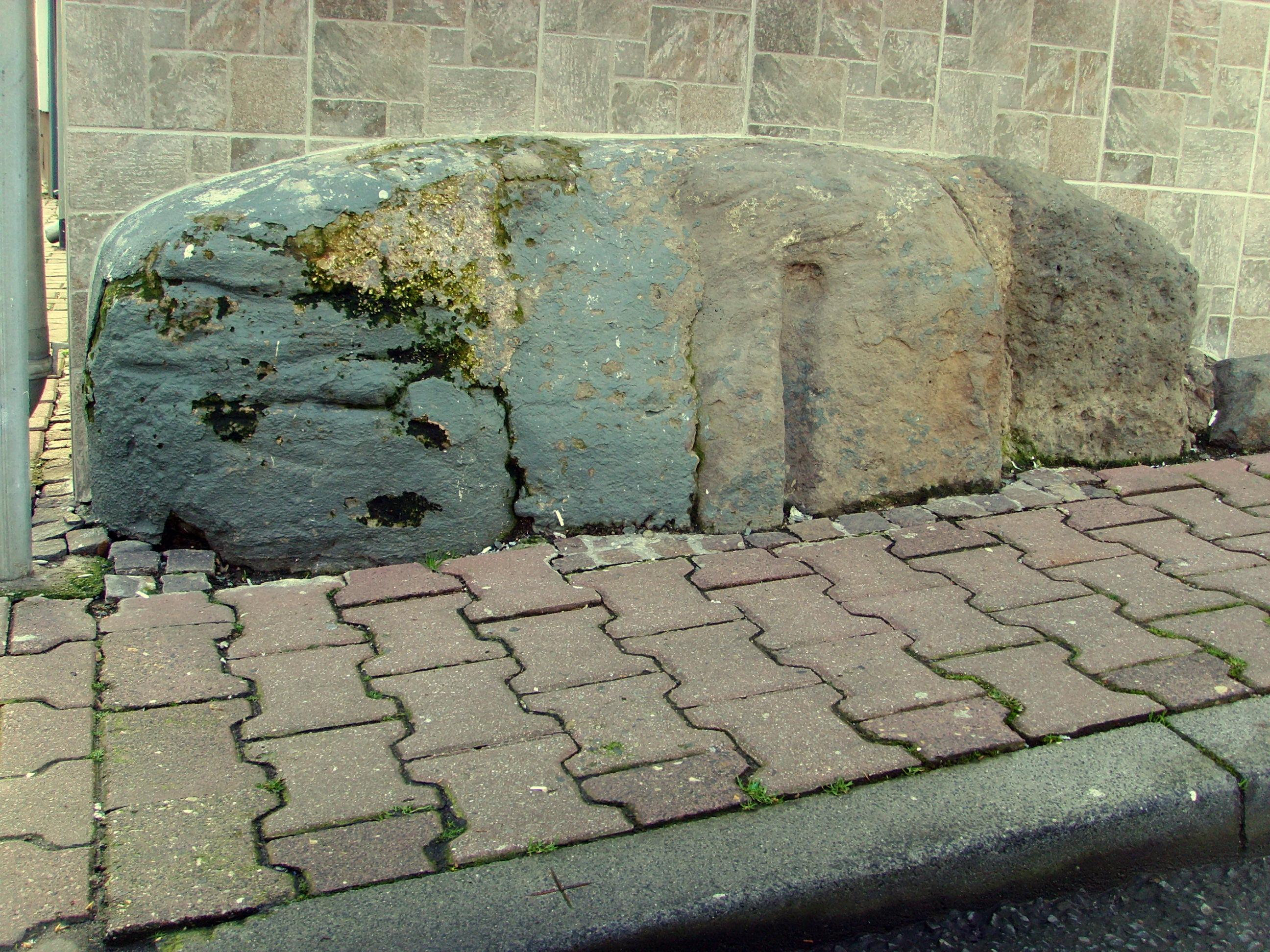 this photo was taken by User:Gerbil from de.Wikipedia in march 2007 römische Türschwelle aus der antiken römischen Siedlung Nida (ca. 83 – ca. 260), heute Frankfurt am Main-Heddernheim, Wenzelweg / Ecke In der Römerstadt (Detailaufnahme) Der Stein wurde gegenüber seiner ursprünglichen Lange in römischer Zeit um 90 Grad gekippt und diente an seinem neuen Ort als Abstandshalter zum Schutz des Eckhauses vor zu eng abbiegenden Pferdewagen. Die Einkerbungen waren Verankerungsrinnen für Holzteile. Roman threshold from the ancient Roman city "Nida" (today: Frankfurt am Main-Heddernheim), in early 19th century 'recycled' as a spacer to protect the quoin against horse coaches